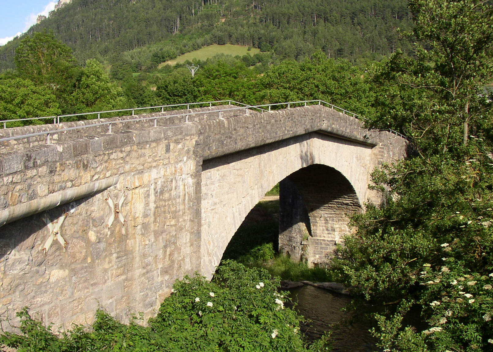 Pont d'Esclanède en fin d'après-midi. Façade ouest